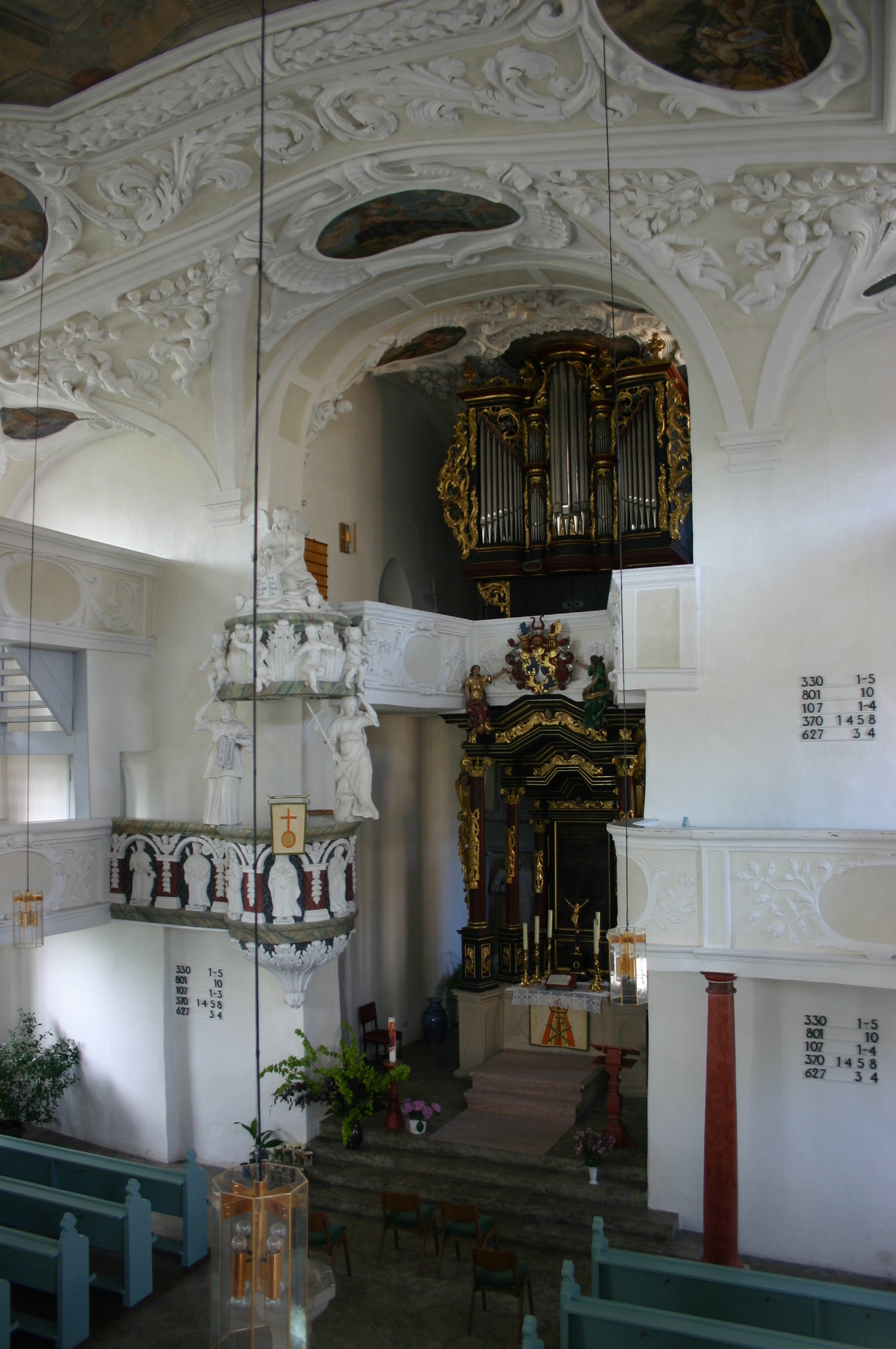 St.-Laurentius-Kirche